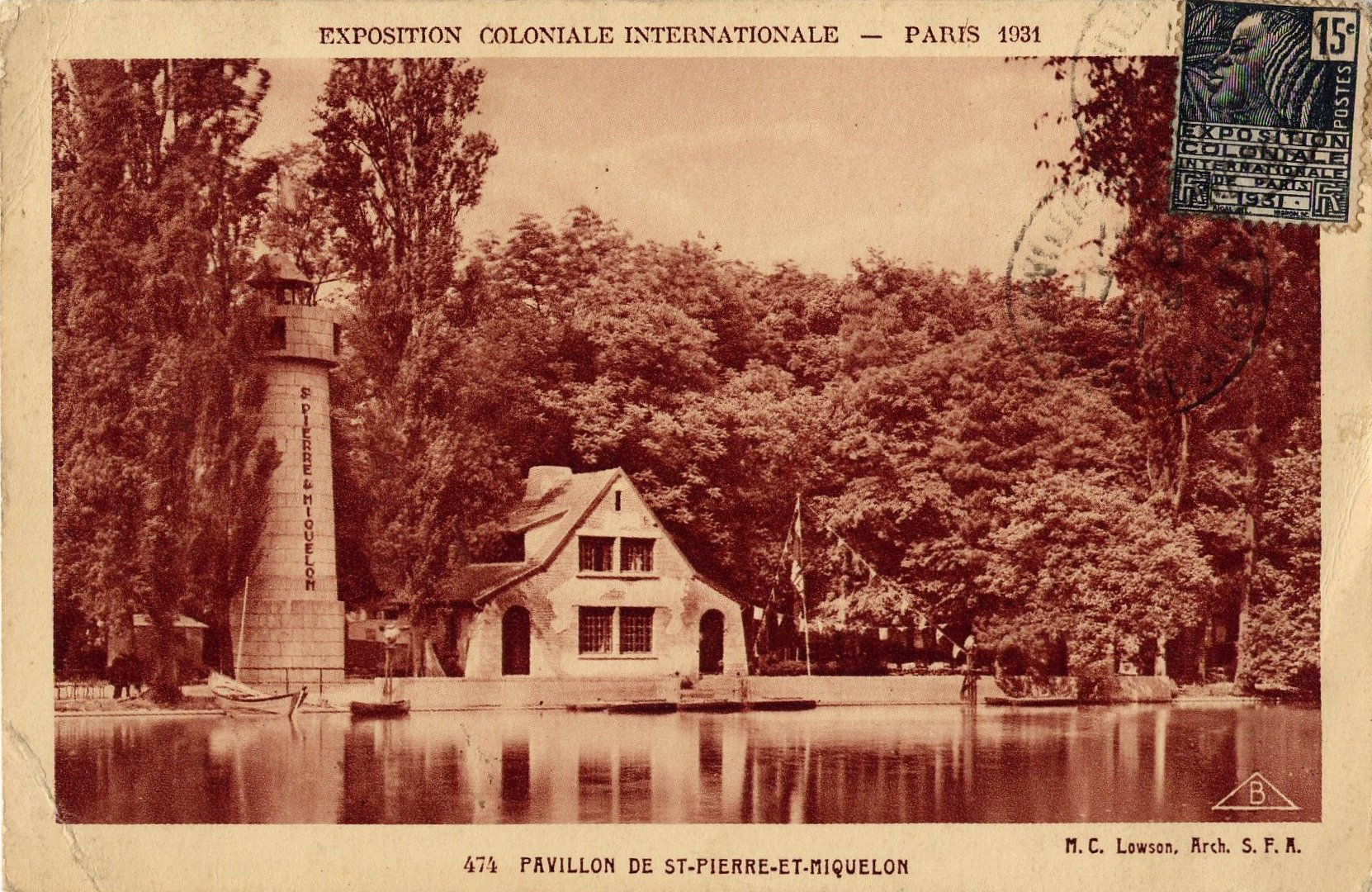 Pavillon de Saint-Pierre et Miquelon à l'Exposition Coloniale de PARIS en 1931